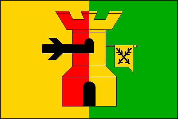 Vlajka obce Vrchovany